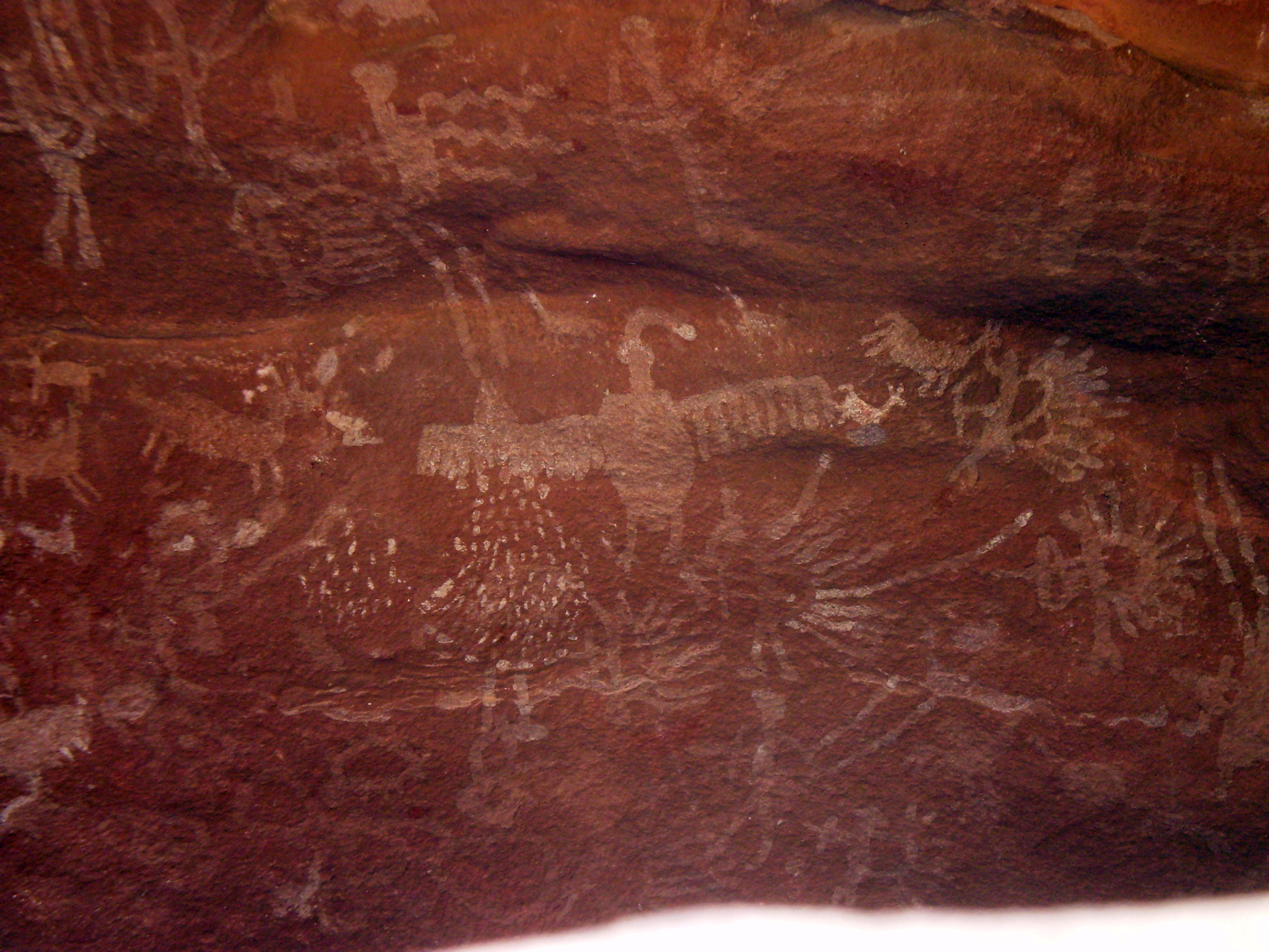 Detalle de pintura rupestre en la Reserva Cultural Natural de Cerro Colorado, Córdoba, Argentina